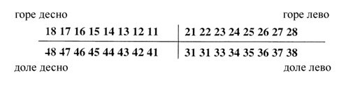 Obeležavanje stalnih zuba po FDI sistemu, ustanovljenom u Bukureštu 1970. godine.